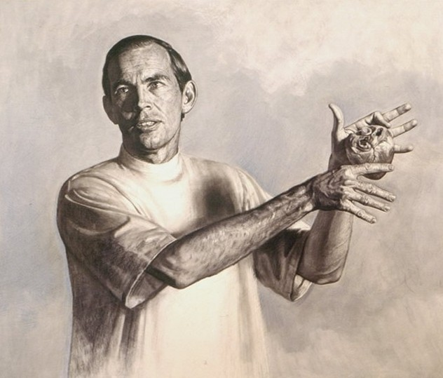 Retrato del Dr. Christian Bernard Temple sobre lienzo. 1960 coleccion privada